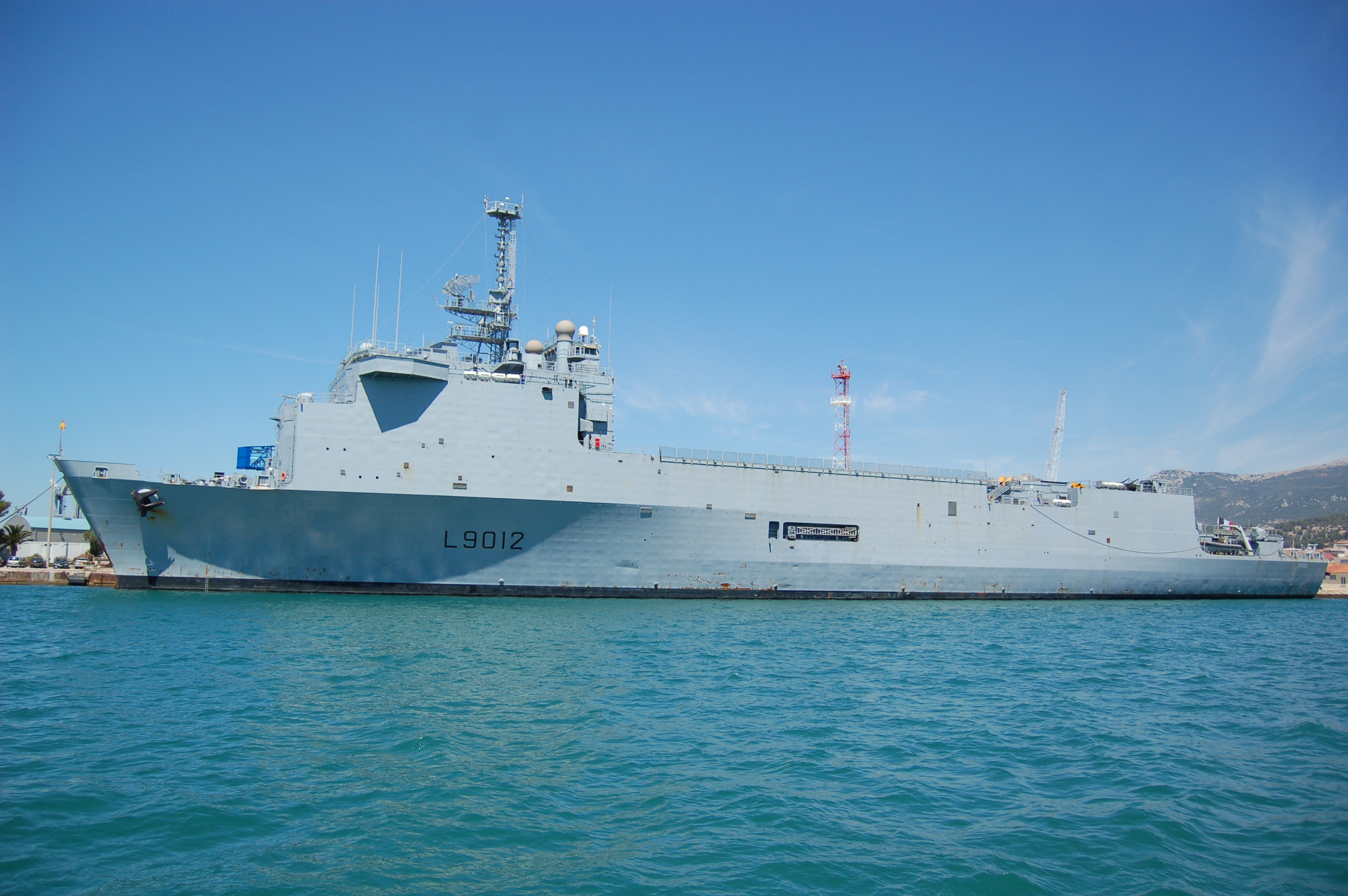 Le transport de chalands de débarquement (TCD) Siroco en rade de Toulon.